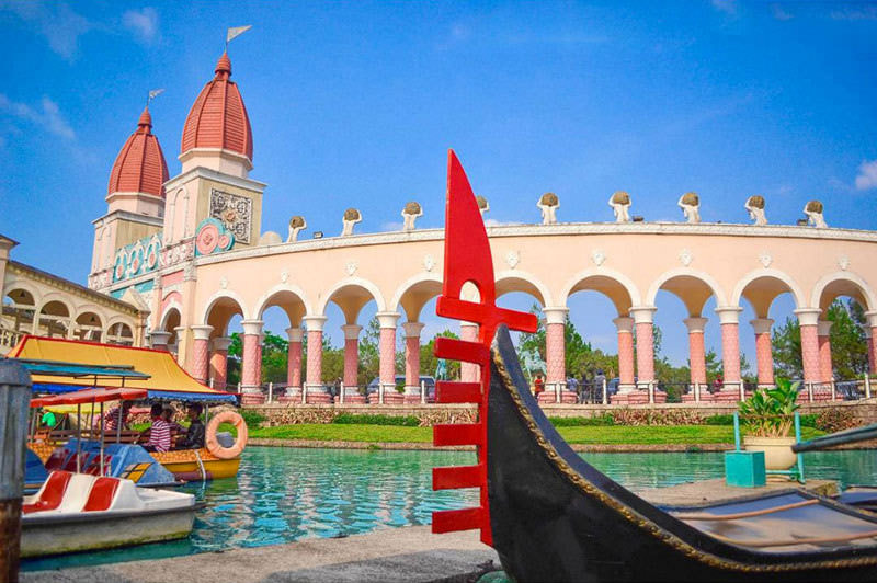 Little Venice Kota Bunga Puncak